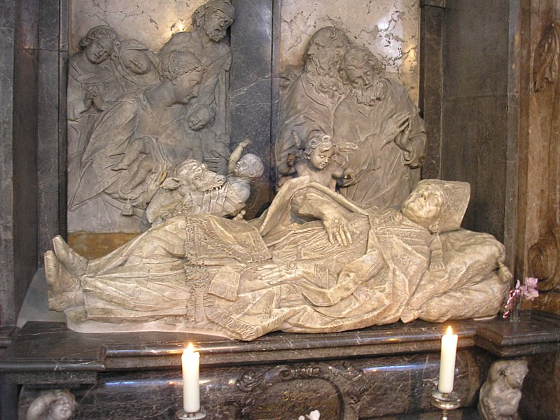 Ehemalige Benediktinerstiftskirche St. Ulrich und Afra (Augsburg, Bayerisch-Schwaben). Die Simpertuskapelle. Das Grab des hl. Simpertus. Eigene Aufnahme, März 2007 / Former Benedictine monastery church St. Ulrich and Afra (Augsburg, Bavaria, Germany). Chapel of St. Simpertus. The tomb of the Saint. Own photo, March 2007